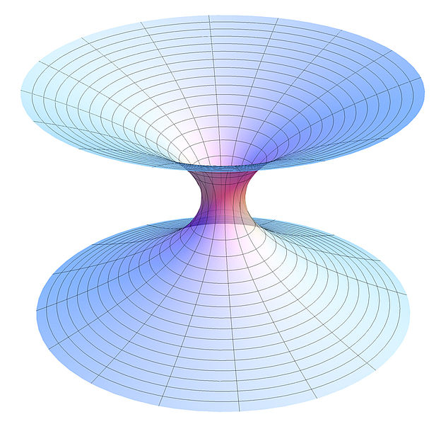 Şvarzşild soxulcan dəliyinin görüntülü izahı. Kainatda soxulcan dəliyi indiyə qədər müşahidə olunmasa da onların varlığı riyazi modellərlə və elmi nəzəriyyələrlə fərz olunur.